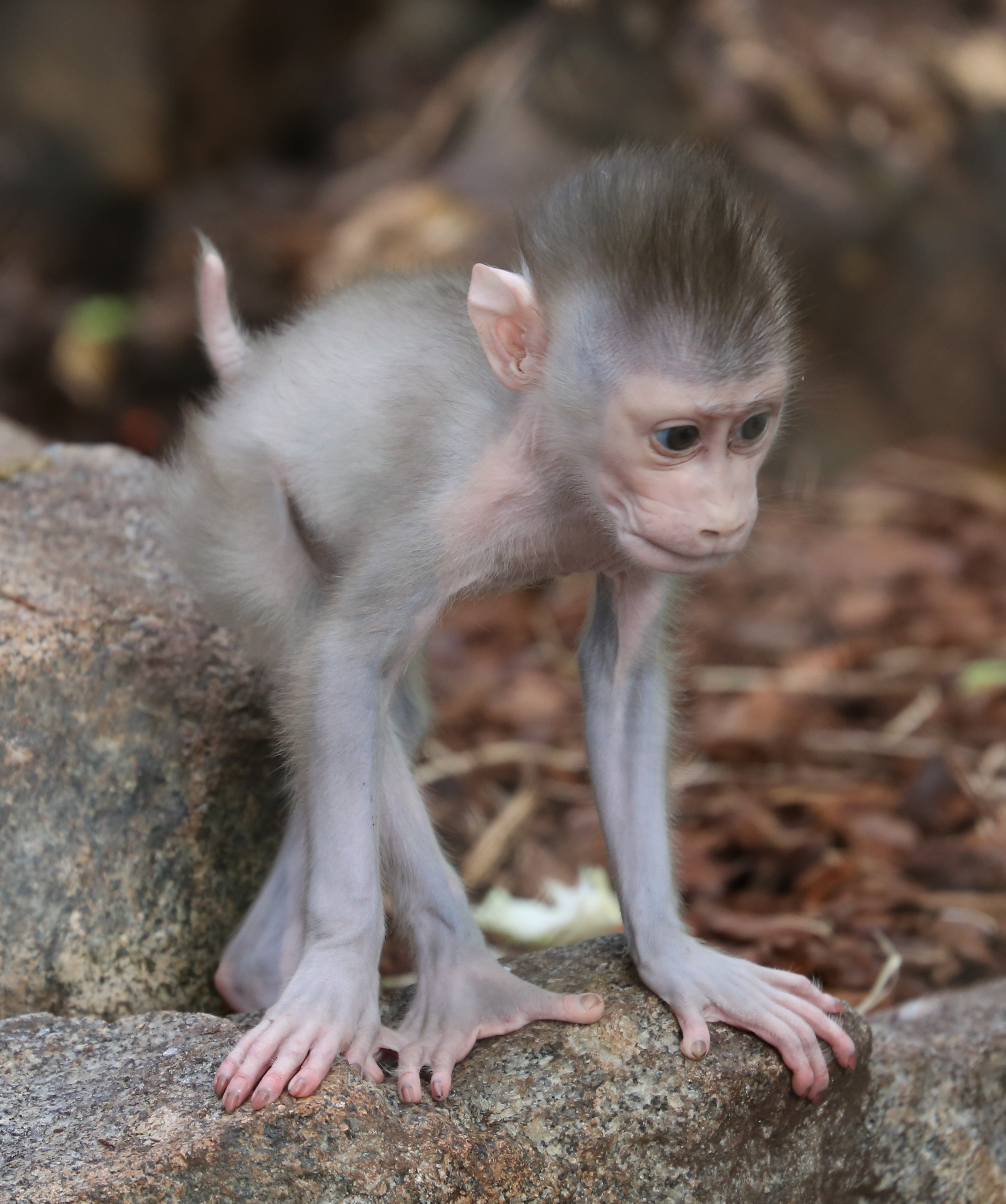 Drill (Mandrillus leucophaeus), Tierpark Hellabrunn, München